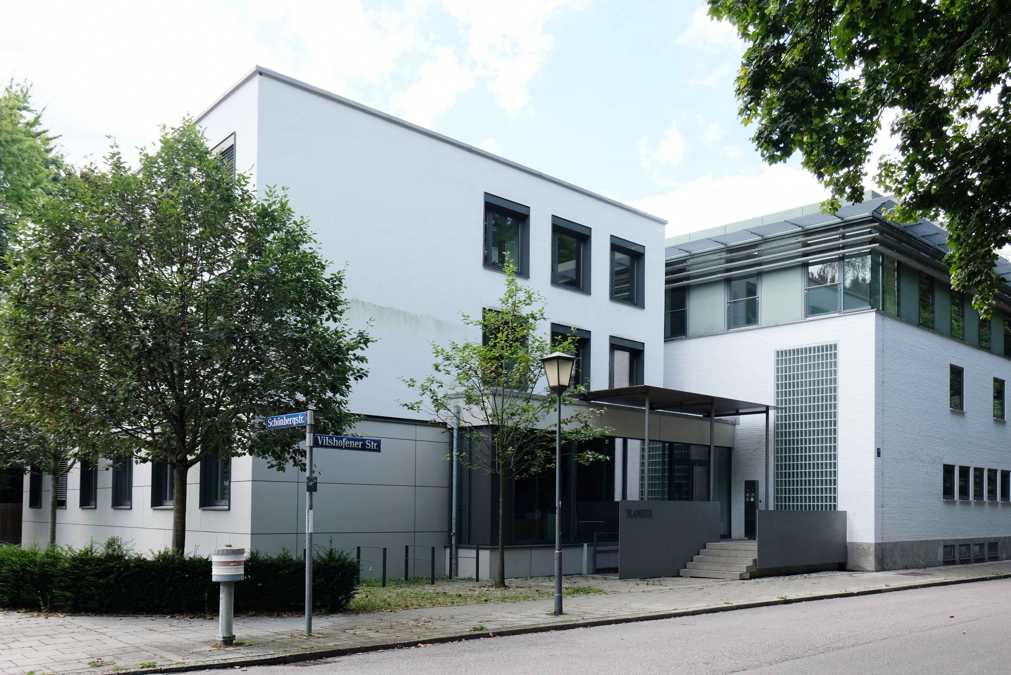 Sitz der Hanser Literaturverlage in der Vilshofener Straße, München-Bogenhausen (2020)